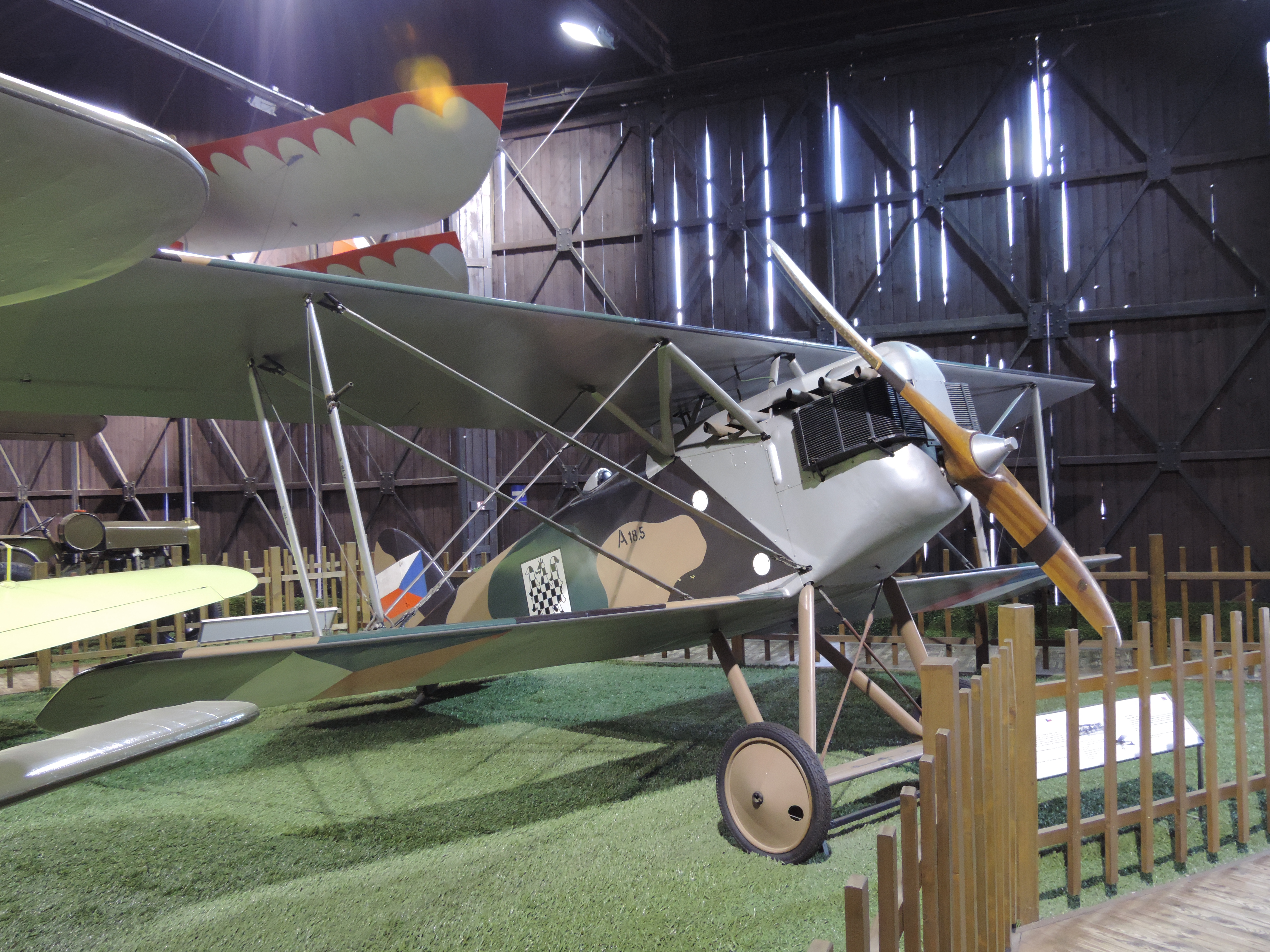 Aero A.18 im Flugzeugmuseum Kbely